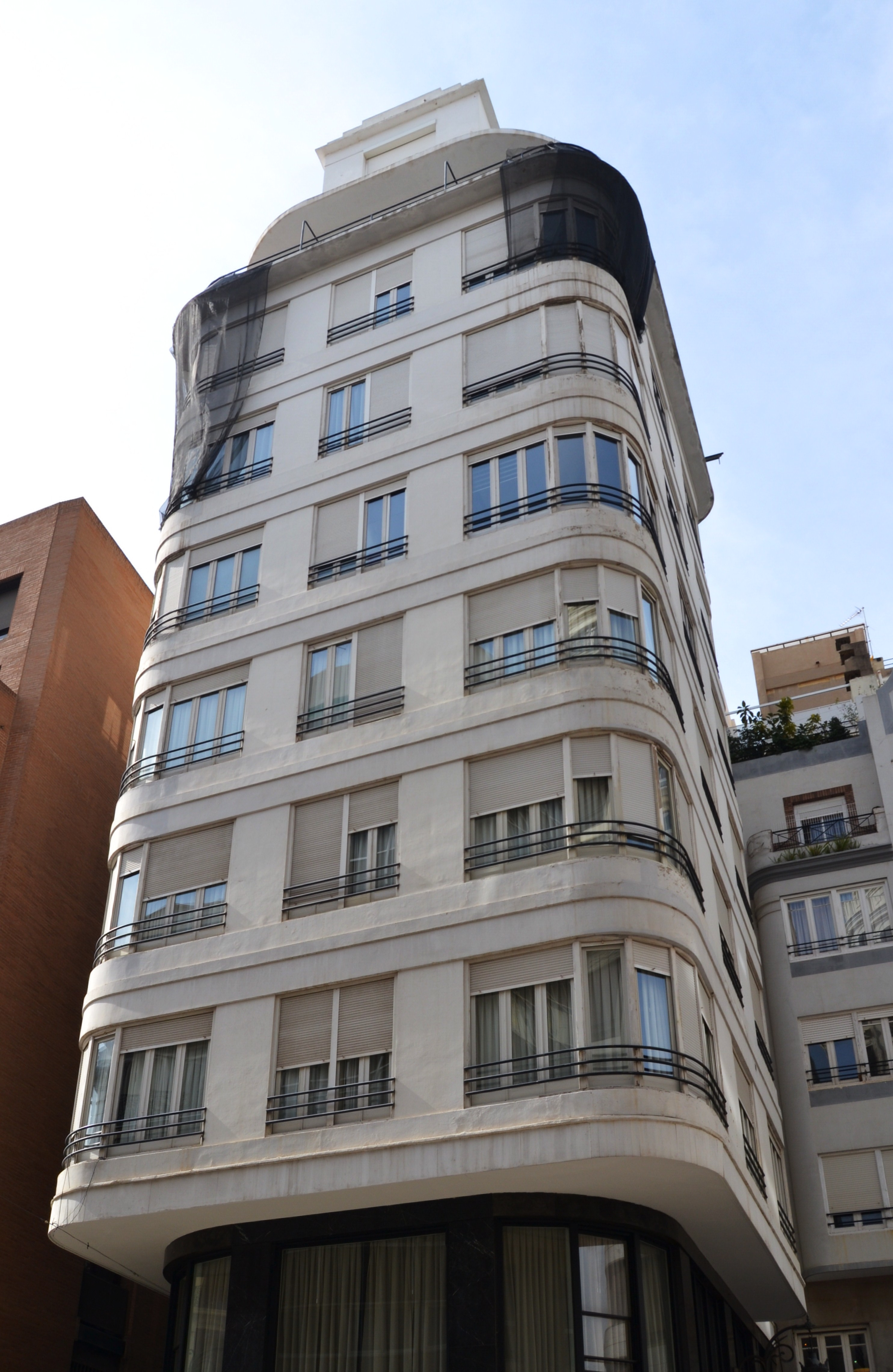 València, edifici Roca.